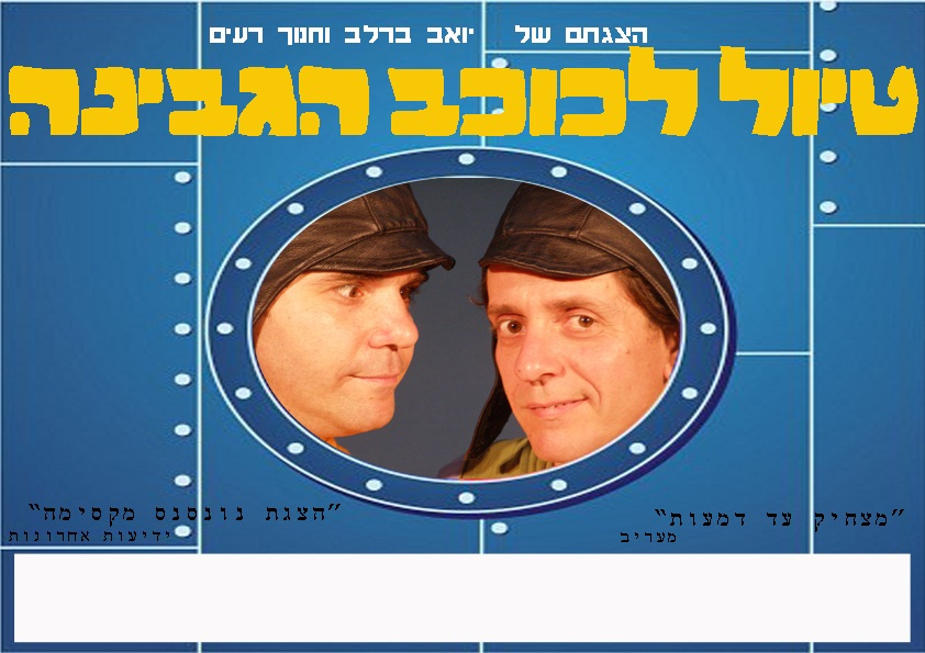 11 פוסטר טיול לכוכב הגבינה